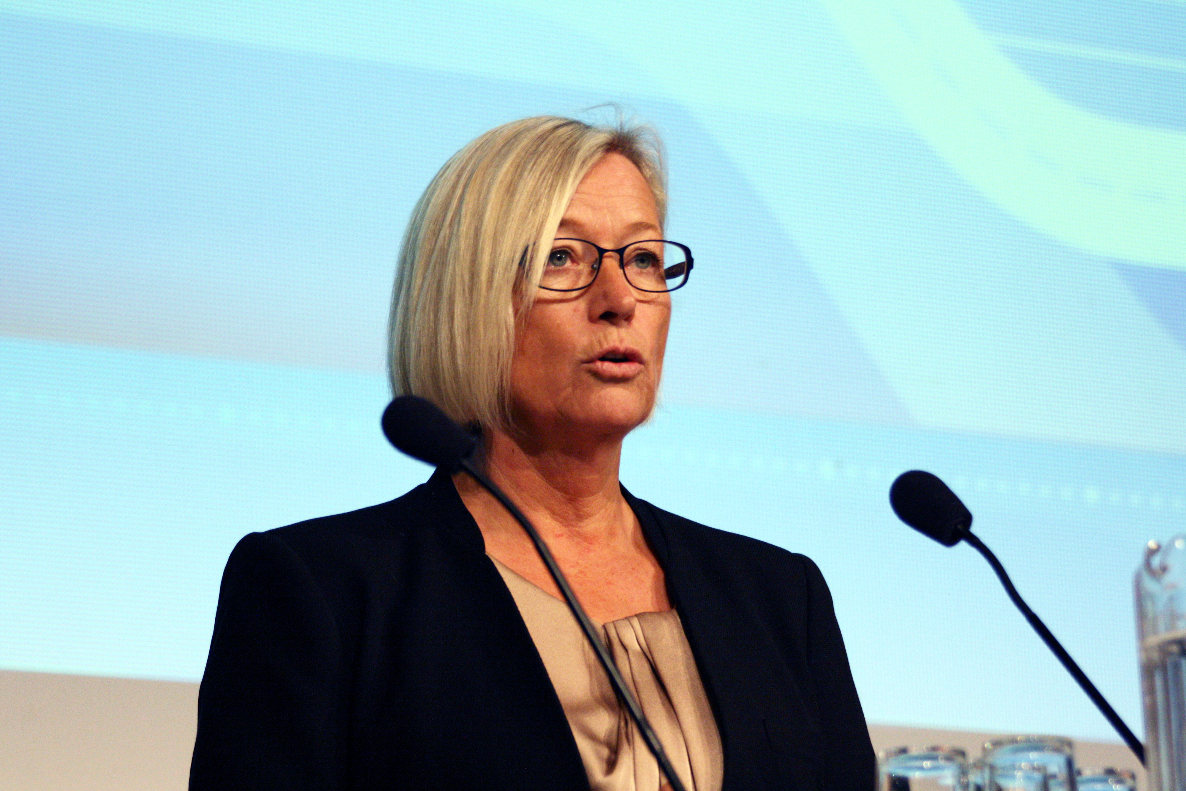 Samferdselsminister Marit Arnstad (Sp) på Gardermoen høsten 2012.